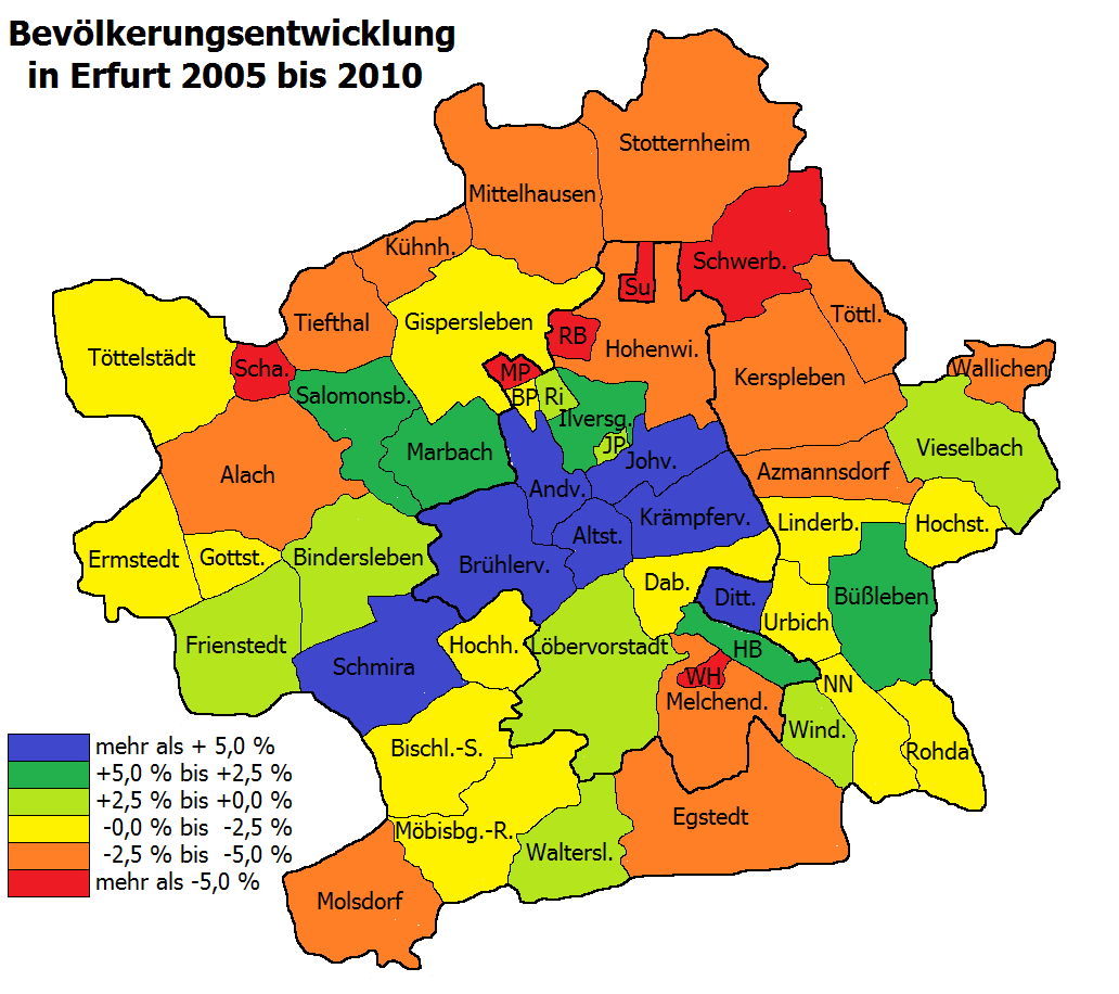 Bevölkerungsentwicklung der Stadtteile Erfurts vom 31. Dezember 2005 bis 31. Dezember 2010.